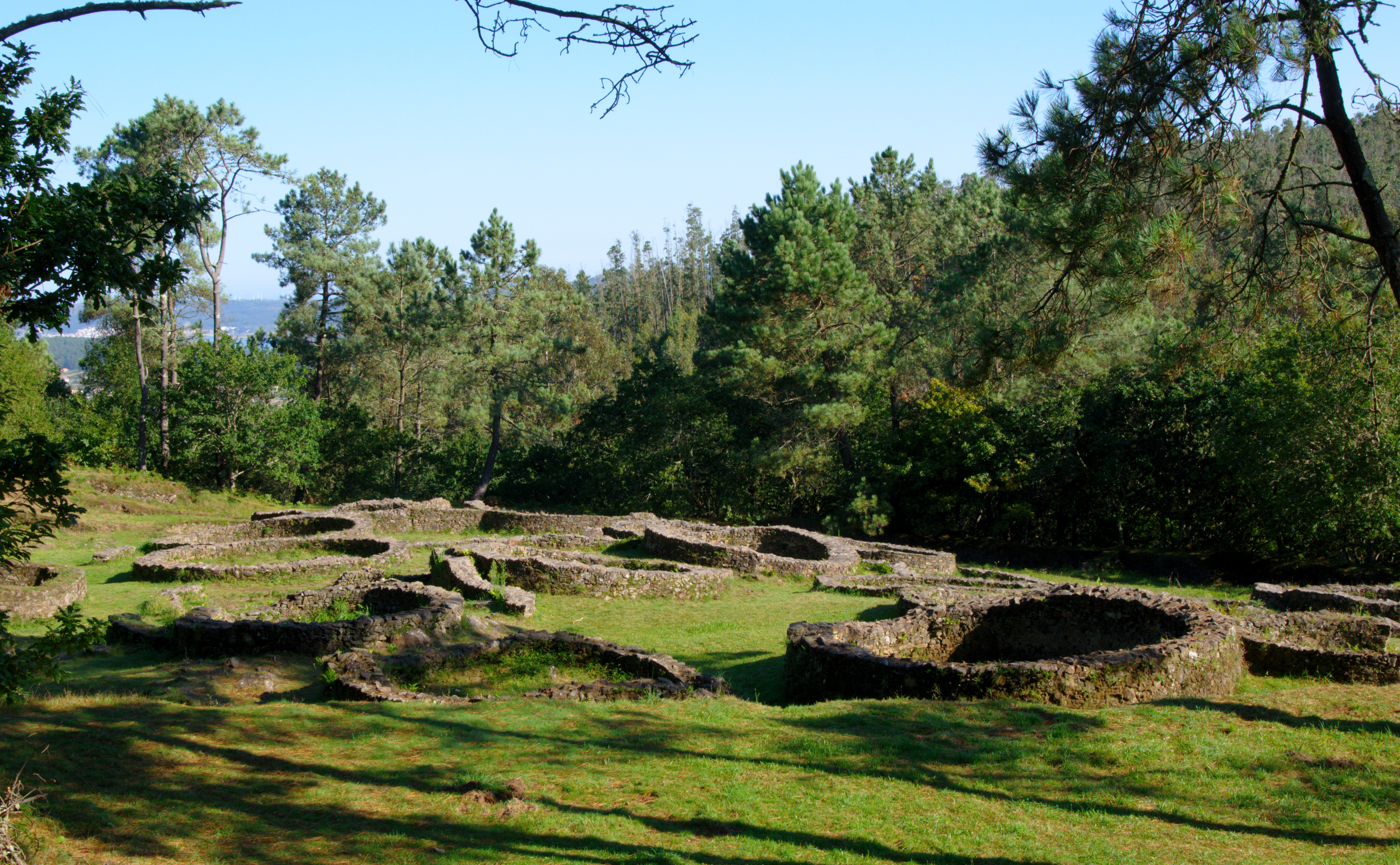 En el Interior del Castro de Borneiro